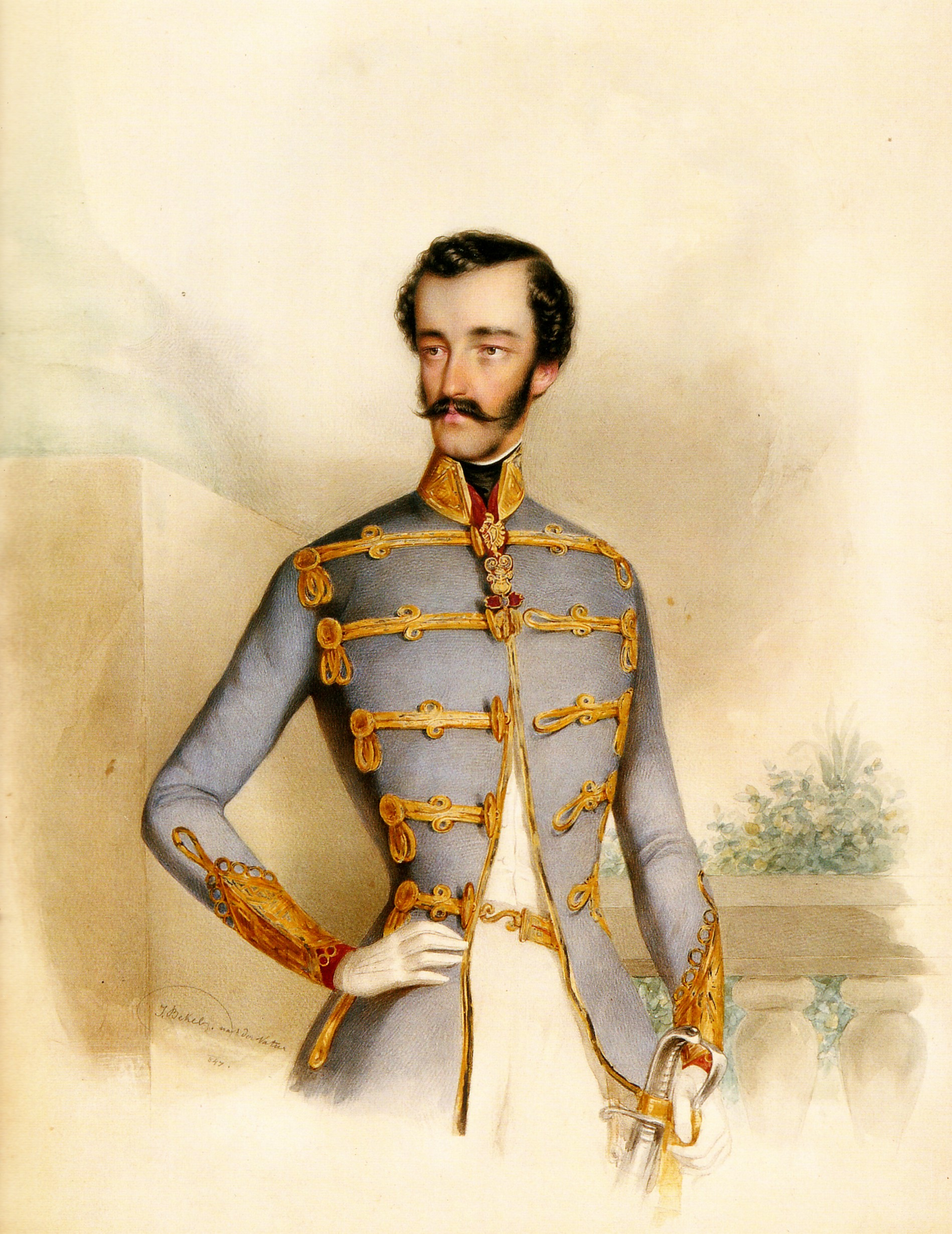 István nádor portréja. Joseph Bekel akvarellje (1847)